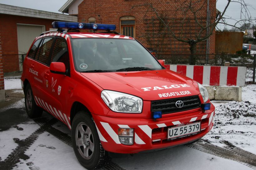 Feuerwehr-Einsatzfahrzeug von Falck